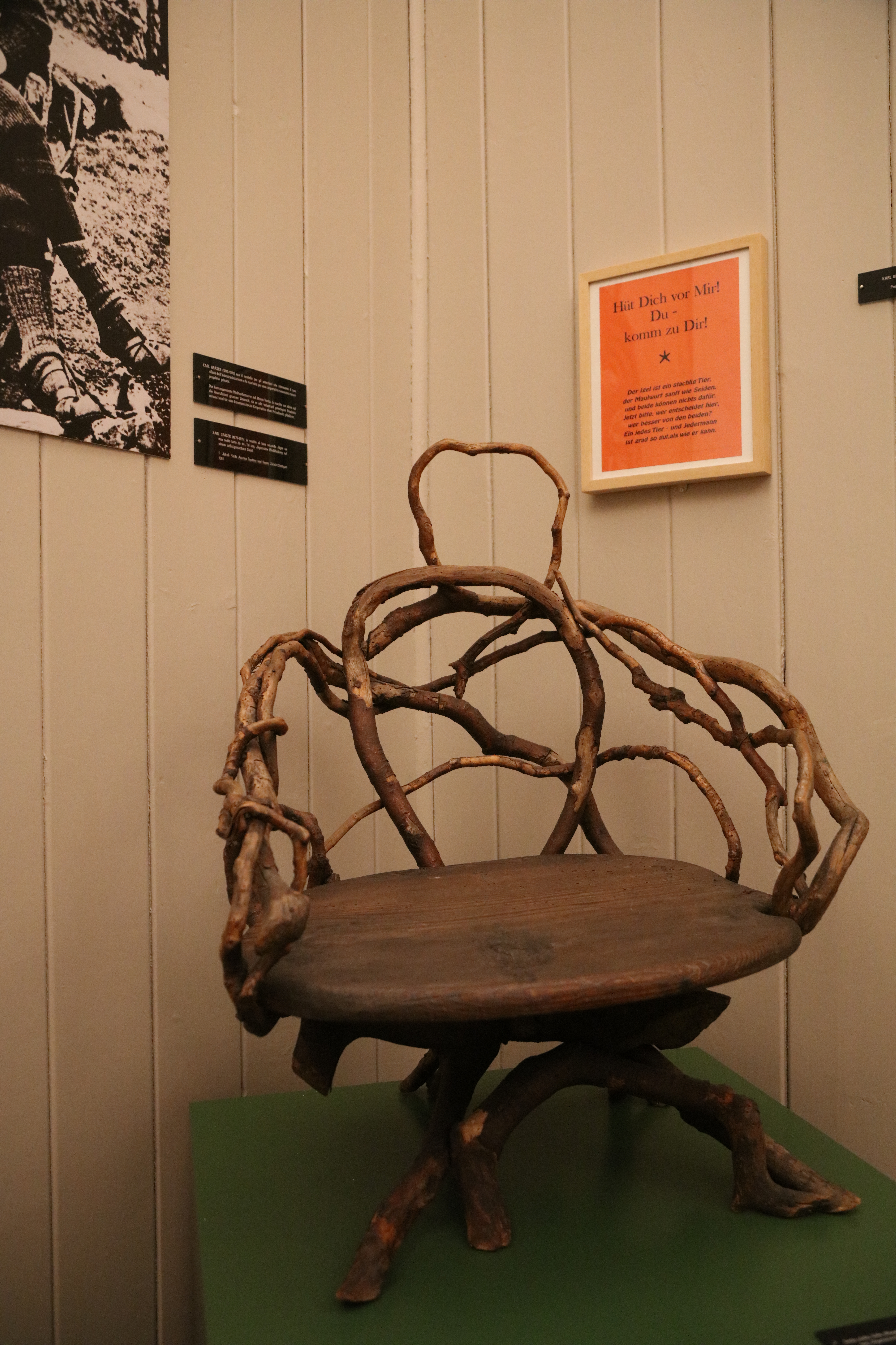 Innenaufnahmen aus der Casa Anatta.